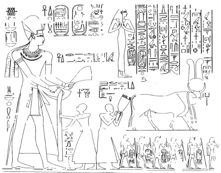 Darstellung Min-Fest-Prozession im Millionenjahrhaus (Ramesseum), 2.Hof, Ostwand, Nordseite